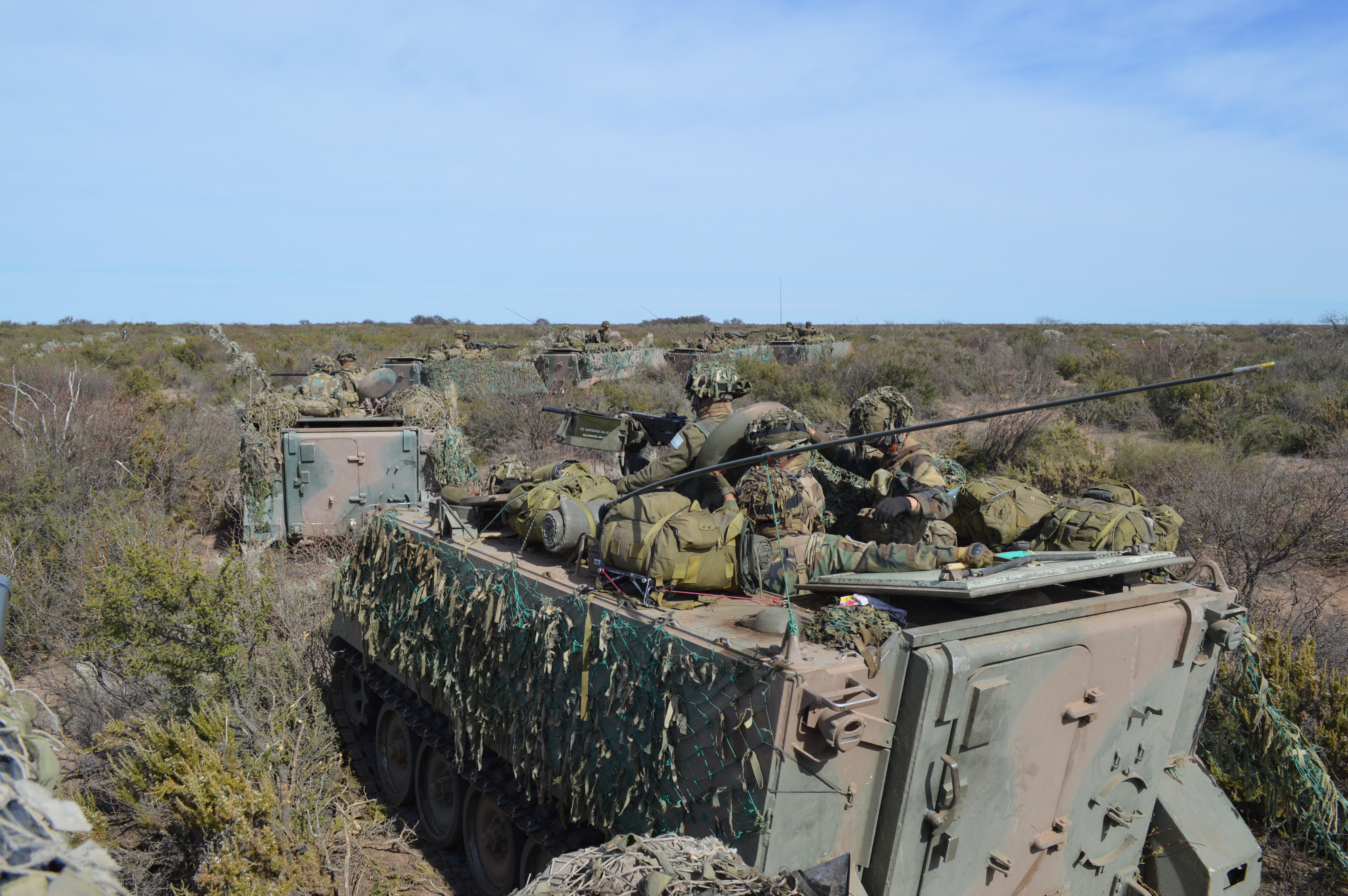 INSTRUCCIÓN RIMEC 12